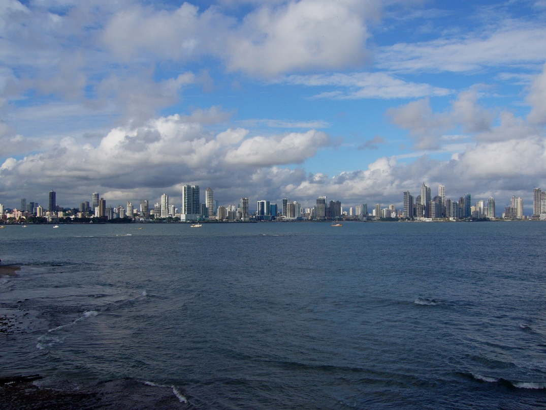 Vista de la ciudad de Panamá, desde el Casco Antiguo